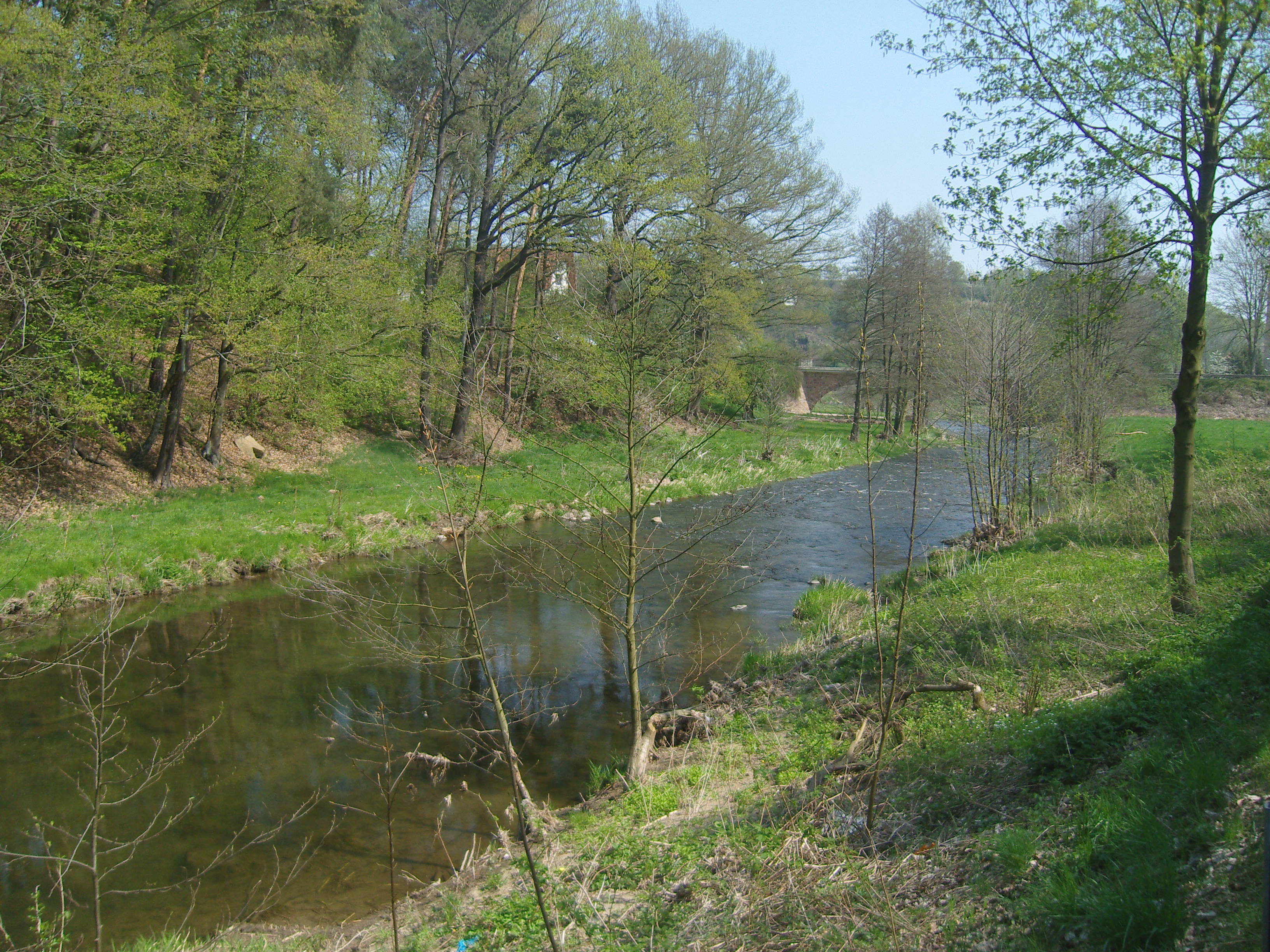 Striegis bei Niederstriegis kurz vor der Einmündung in die Freiberger Mulde